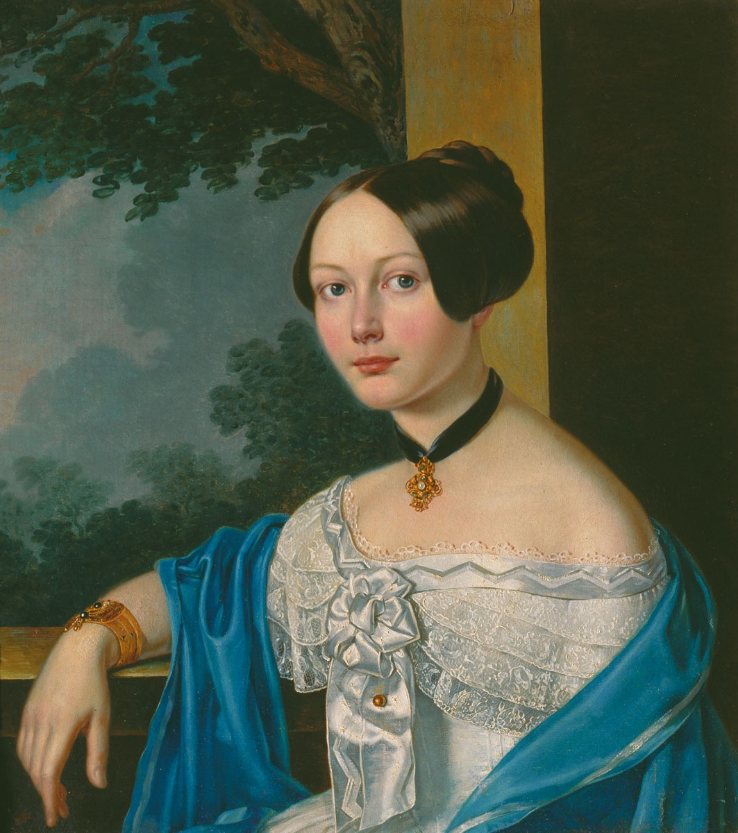 Мария Александровна Талызина(1831-1904), внучка А. В. Суворова, была замужем за Борисом Александровичем Нейдгартом (1819-1900).